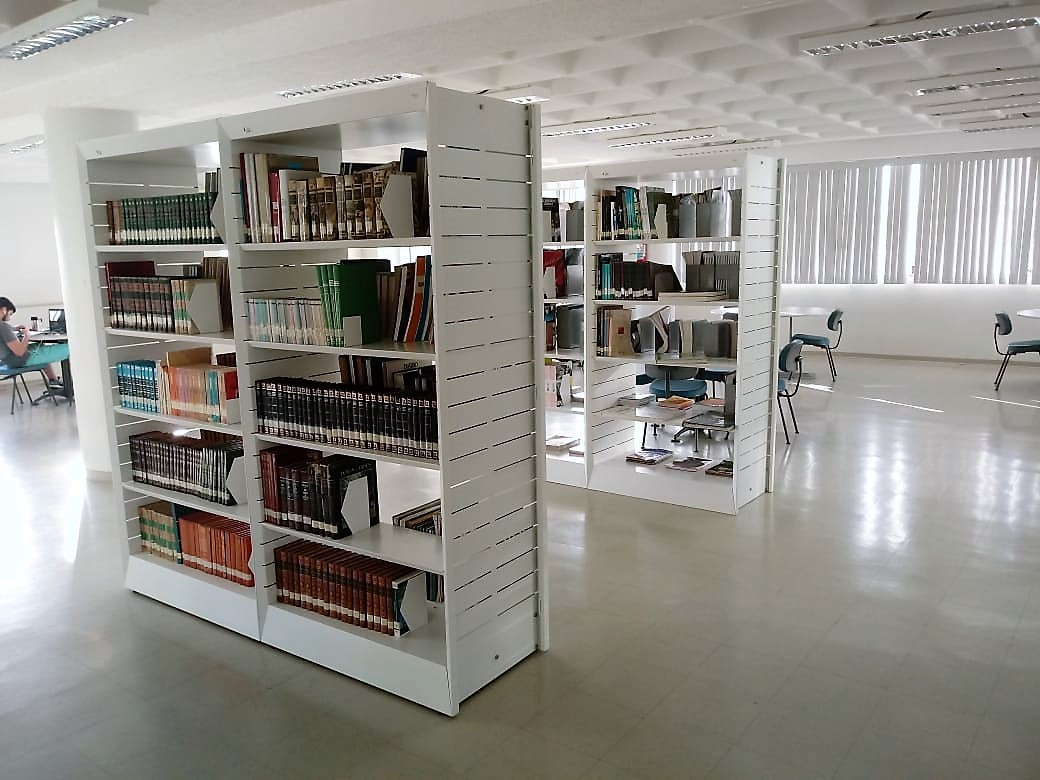 Vista interior da Biblioteca Municipal de Sobral denominada Biblioteca Municipal Lustosa da Costa